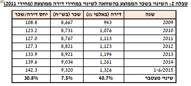 השינוי בשכר הממוצע בהשוואה לשינוי מחירי דירה ממוצעת ב2011